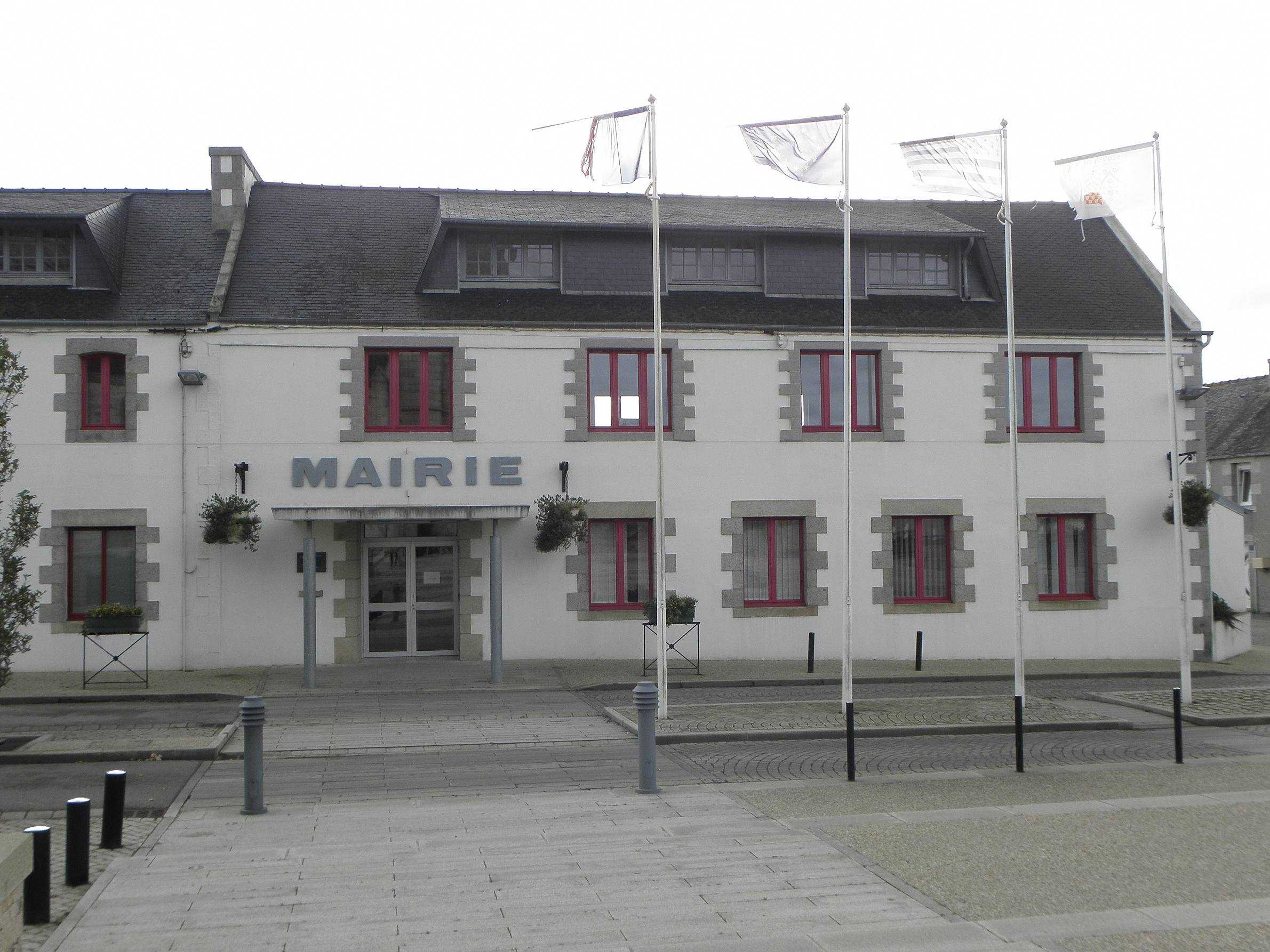 Mairie de Plouénan (29).